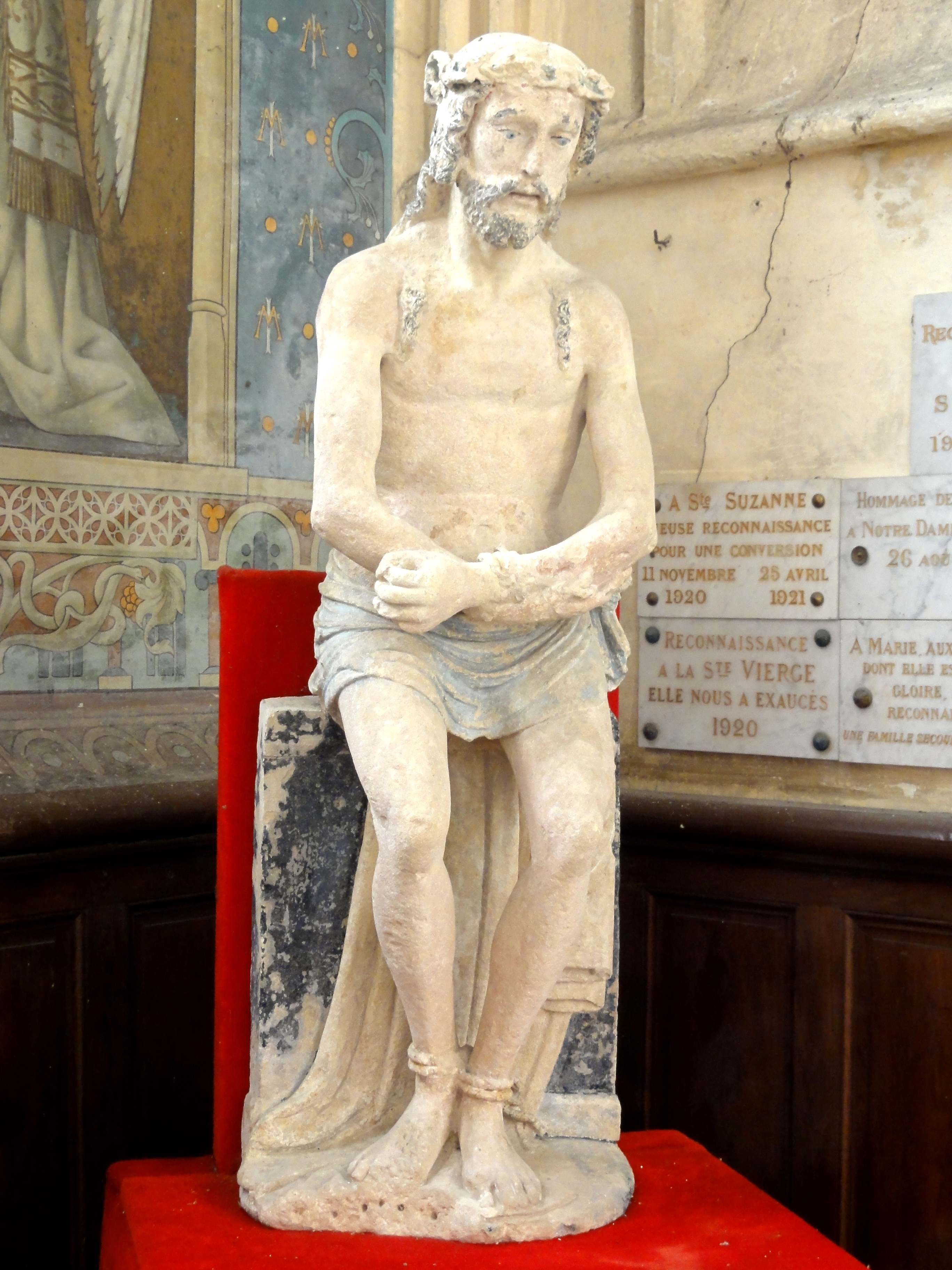 Statue du Christ aux liens, pierre, XVIe siècle.